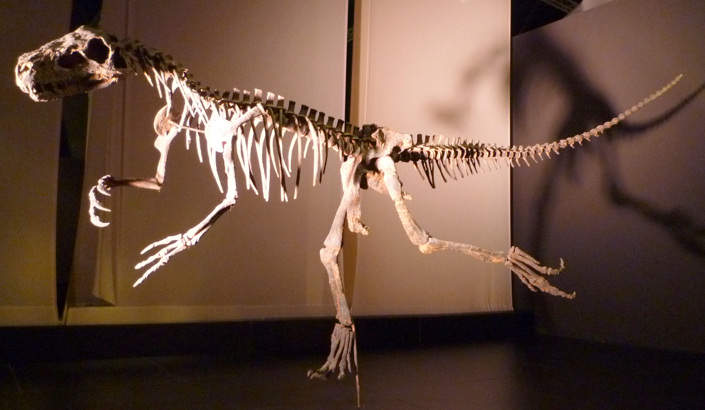 Herrerasaurus ischigualastensis (réplica) en Dinópolis (Teruel)